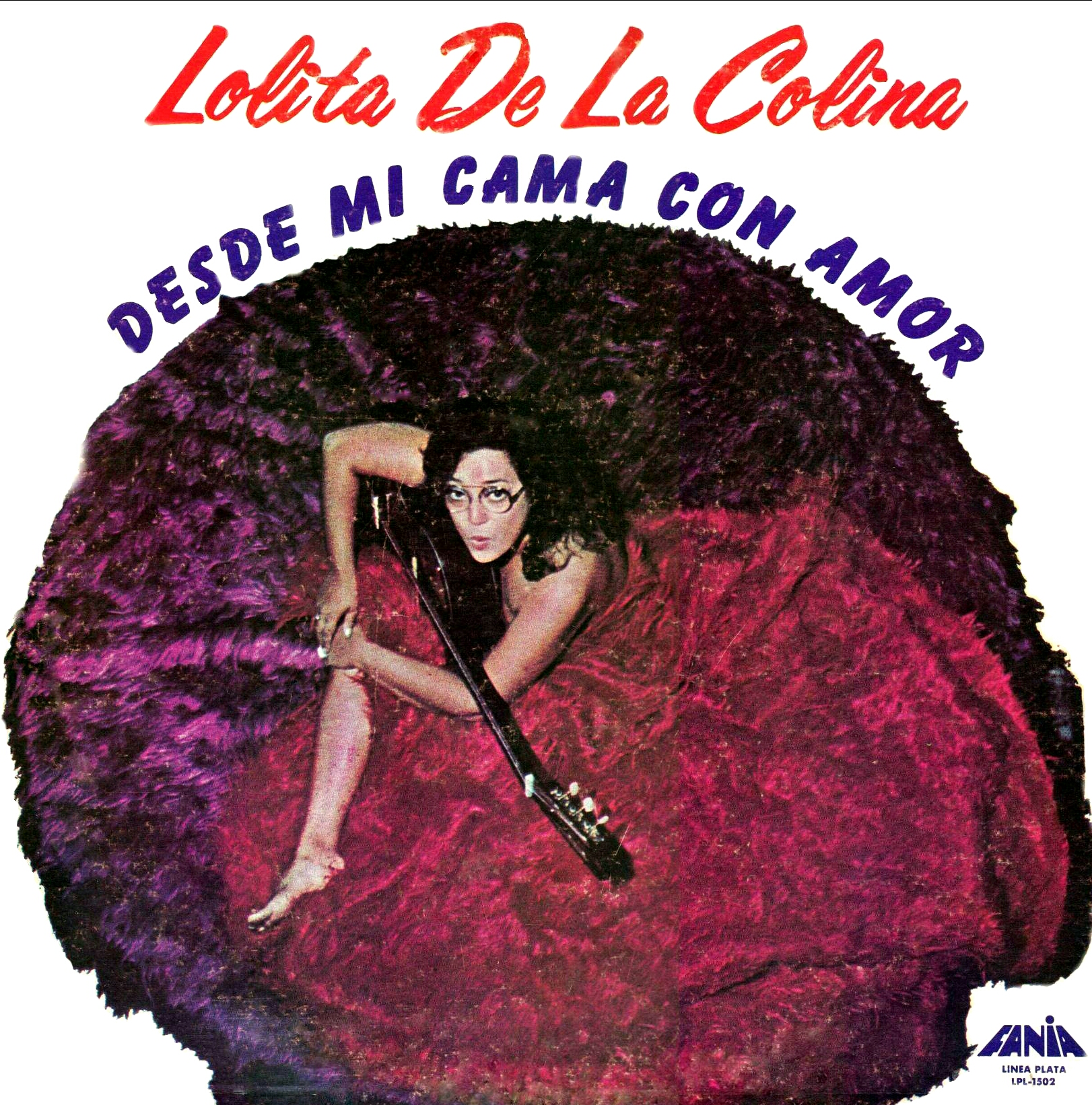 Lp grabado en Nueva York